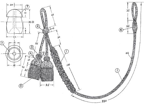 Sznur strzelecki 1931 r.